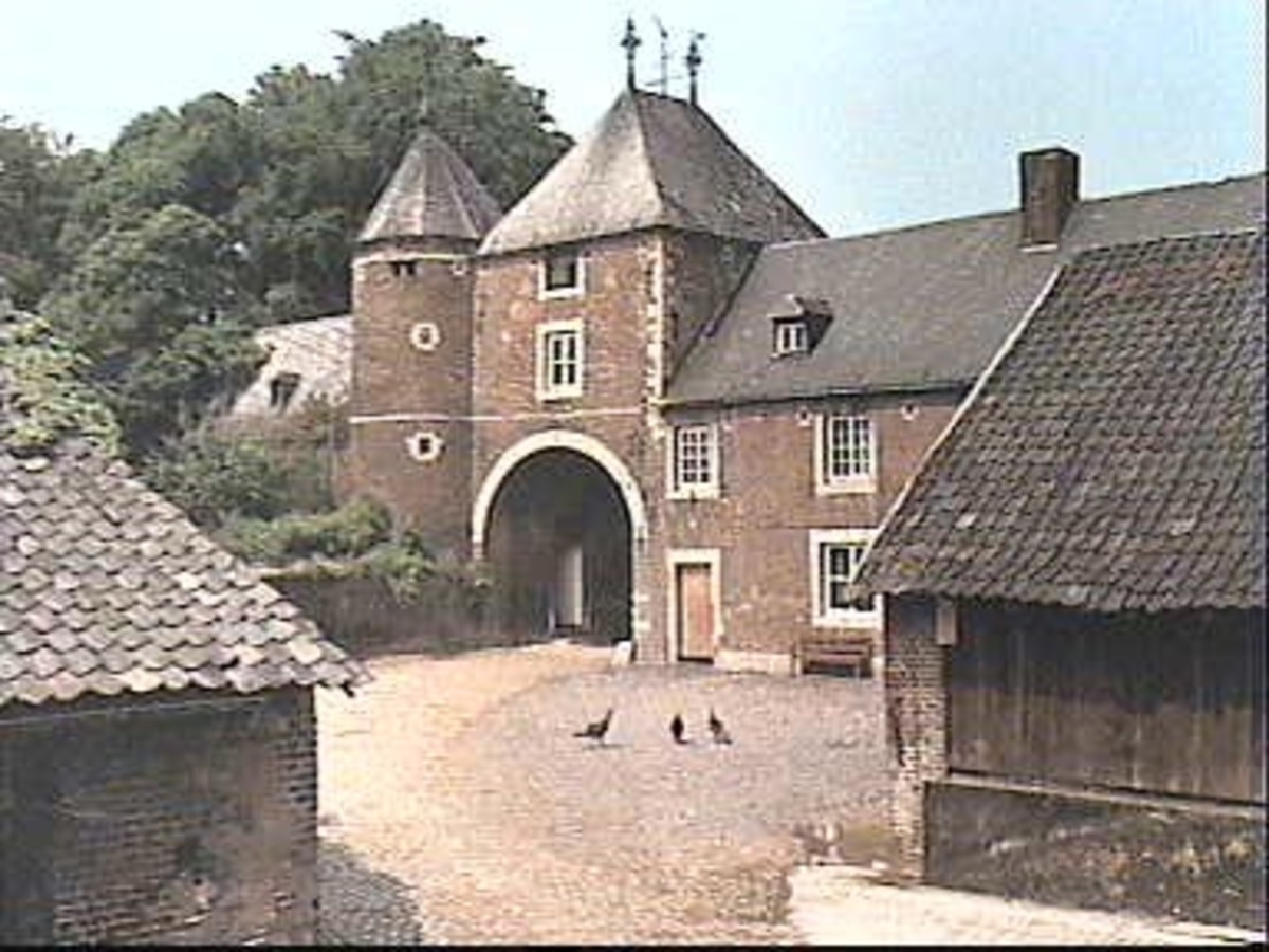 van Printhagen: erf kleur collectie Hendrix' voeders, kalender 1971 (opmerking: Deze afbeelding hebben wij helaas alleen in deze lage resolutie.)